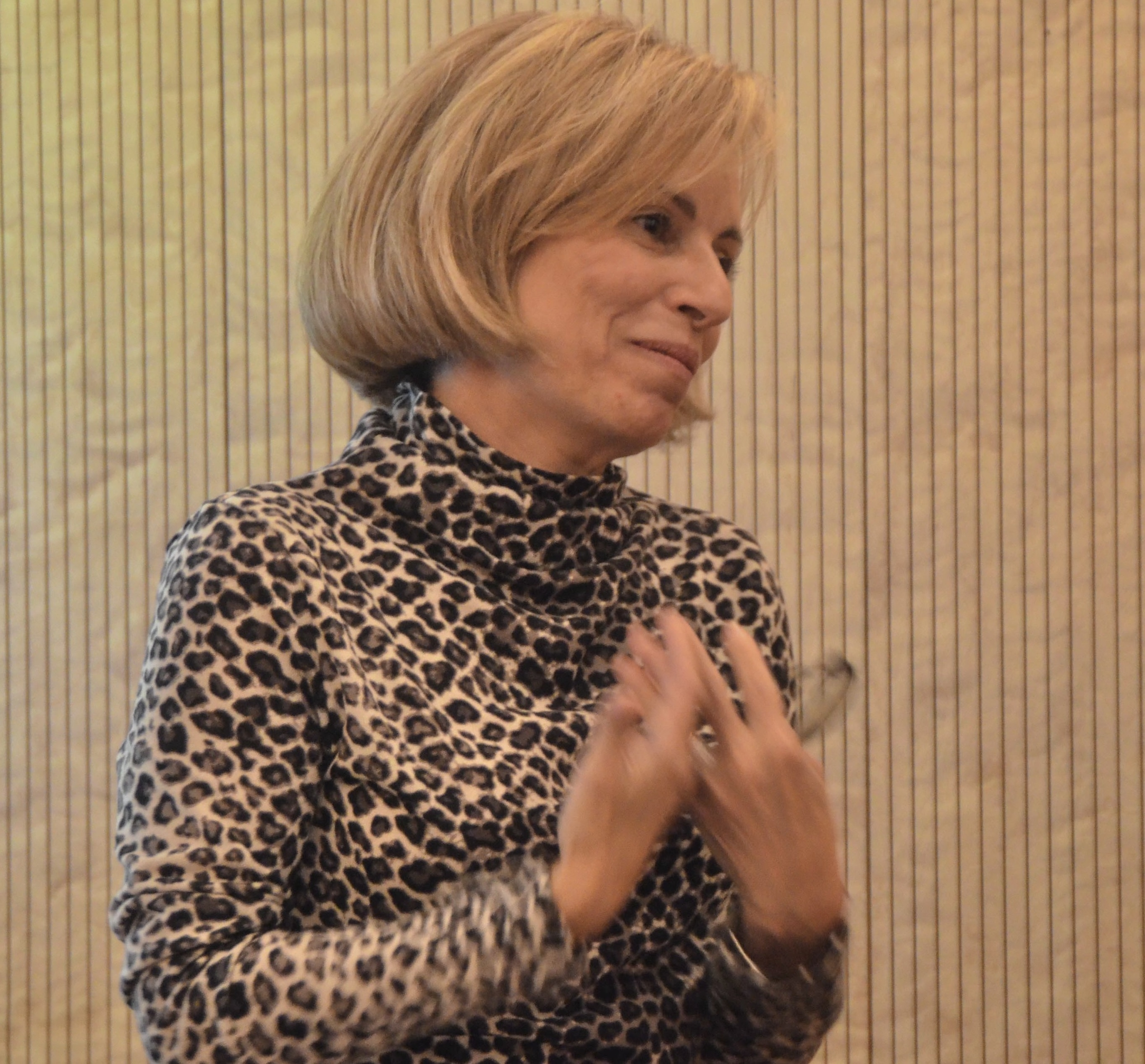 Eva Prenafeta en el recital d'un dels seus contes per a infants, 2018.